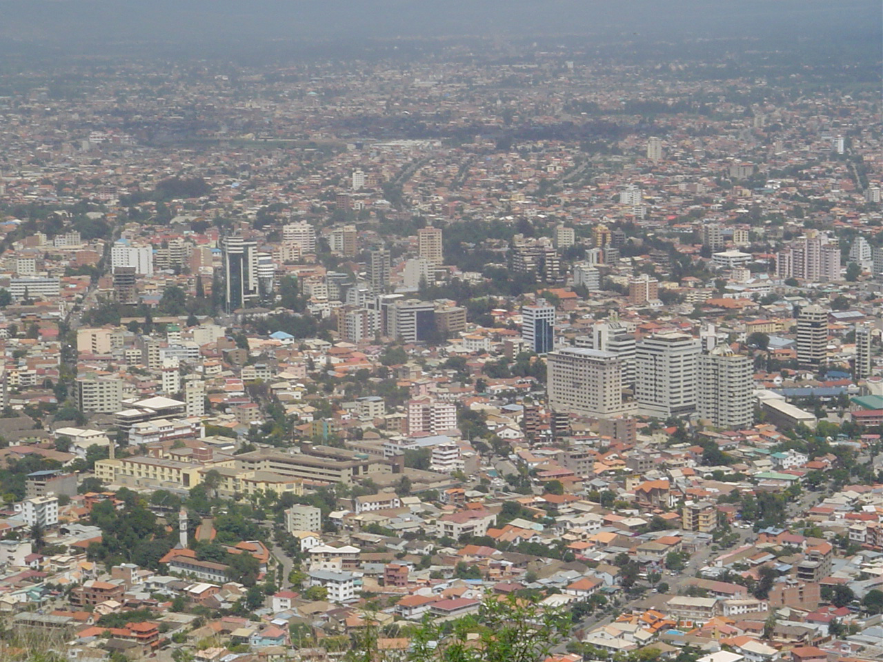 Foto: Alfredo Vasquez Meza